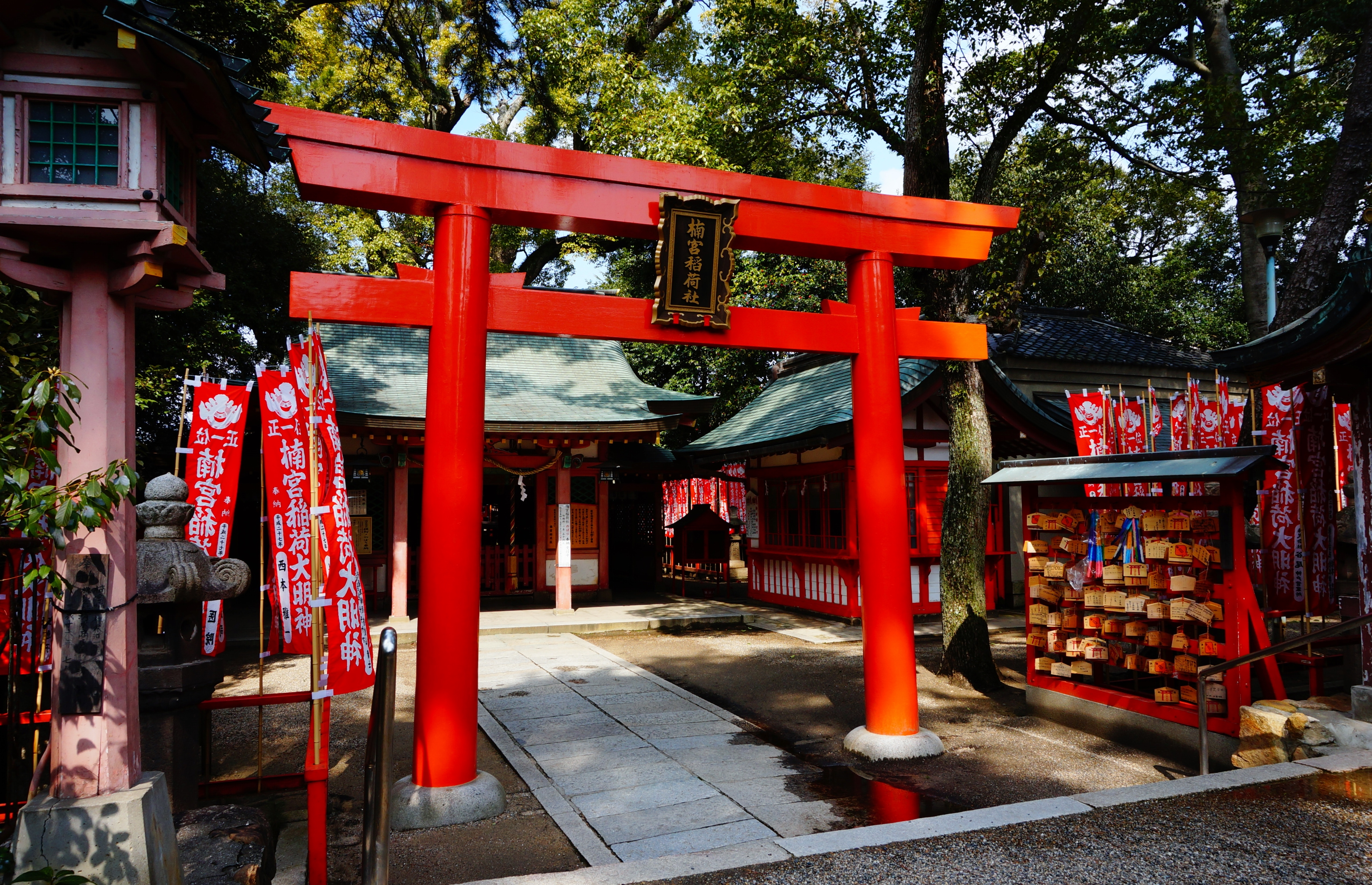 Torii du petit sanctuaire dédié à la divinité Inari